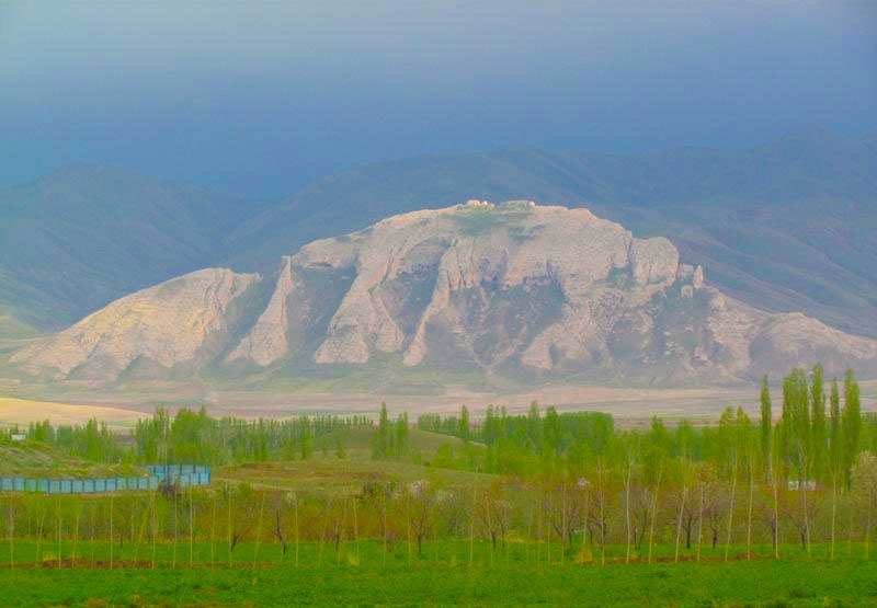 Qarniyariq Salmas